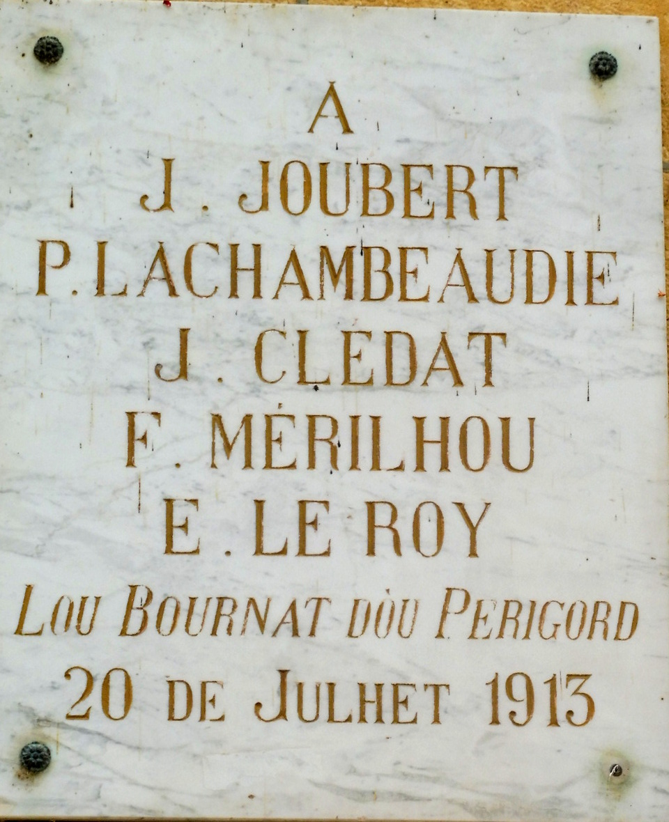 Plaque commémorative de la Félibrée de juillet 1913 à Montignac-24.